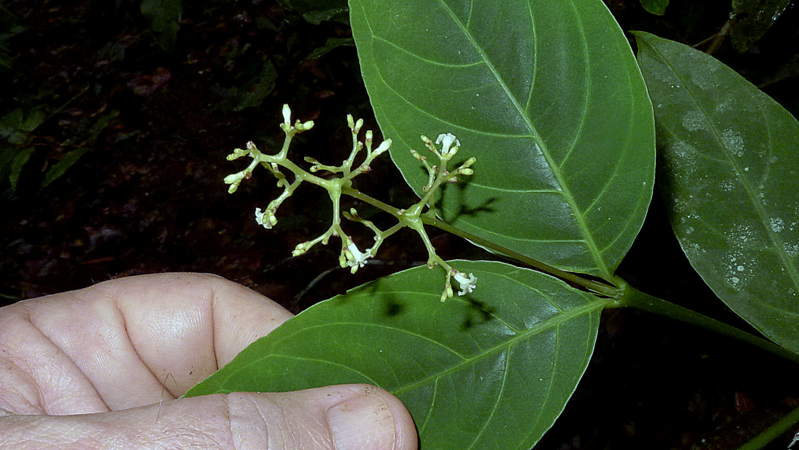 Psychotria deflexa DC.